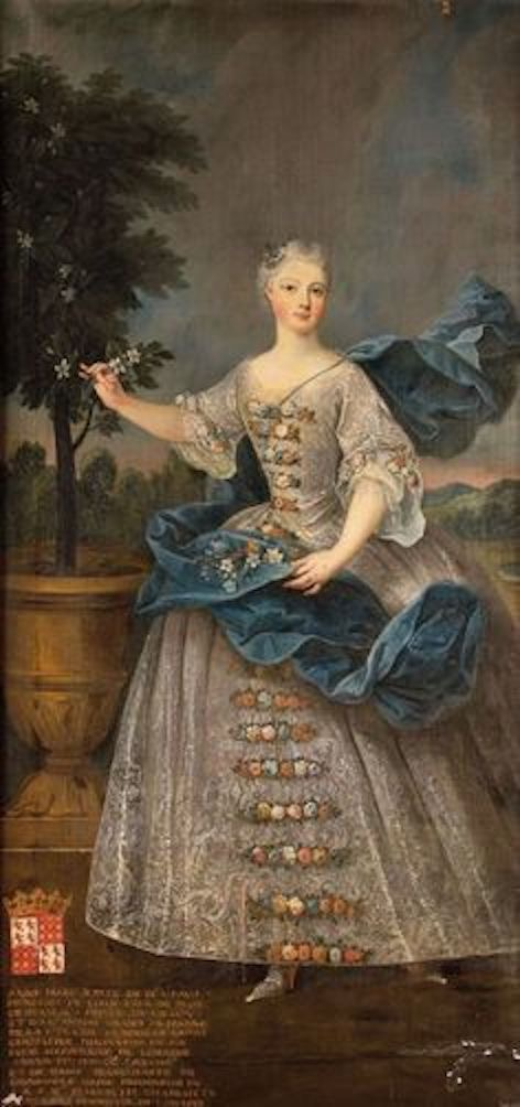 Portrait d'Anne Marguerite en 1730 alors princesse de Lixheim par Pierre Gobert